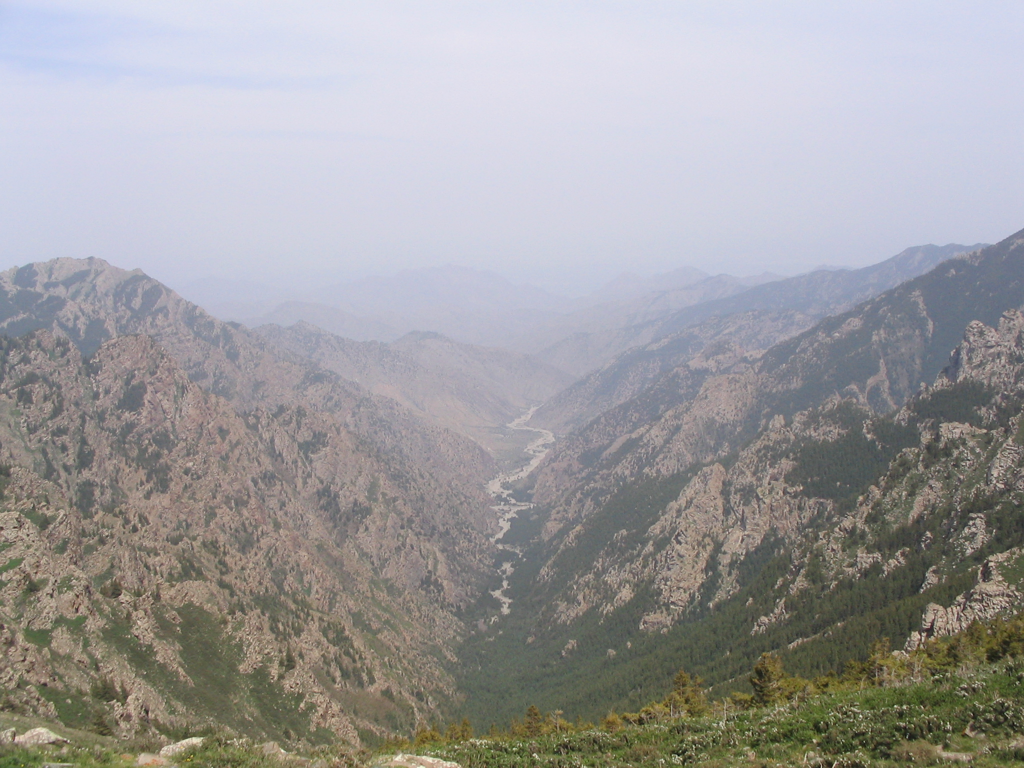 俯瞰贺兰山大水沟，V字型的沟谷和谷底的砾石清晰可见。阴坡和阳坡的植被分布差异非常明显。